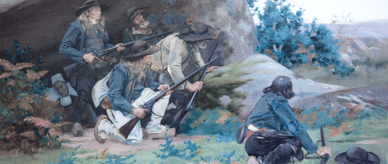 Embuscade de Chouans